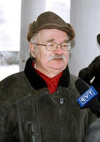 Jerzy Robert Nowak podczas jednego ze spotkań w Kielcach